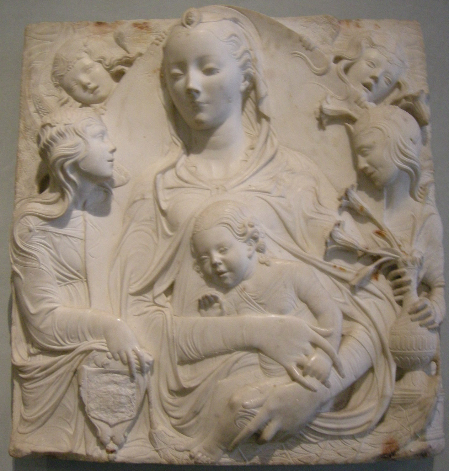 Agostino di duccio, madonna col bambino e quattro angeli (madone d'Auvillers).JPG